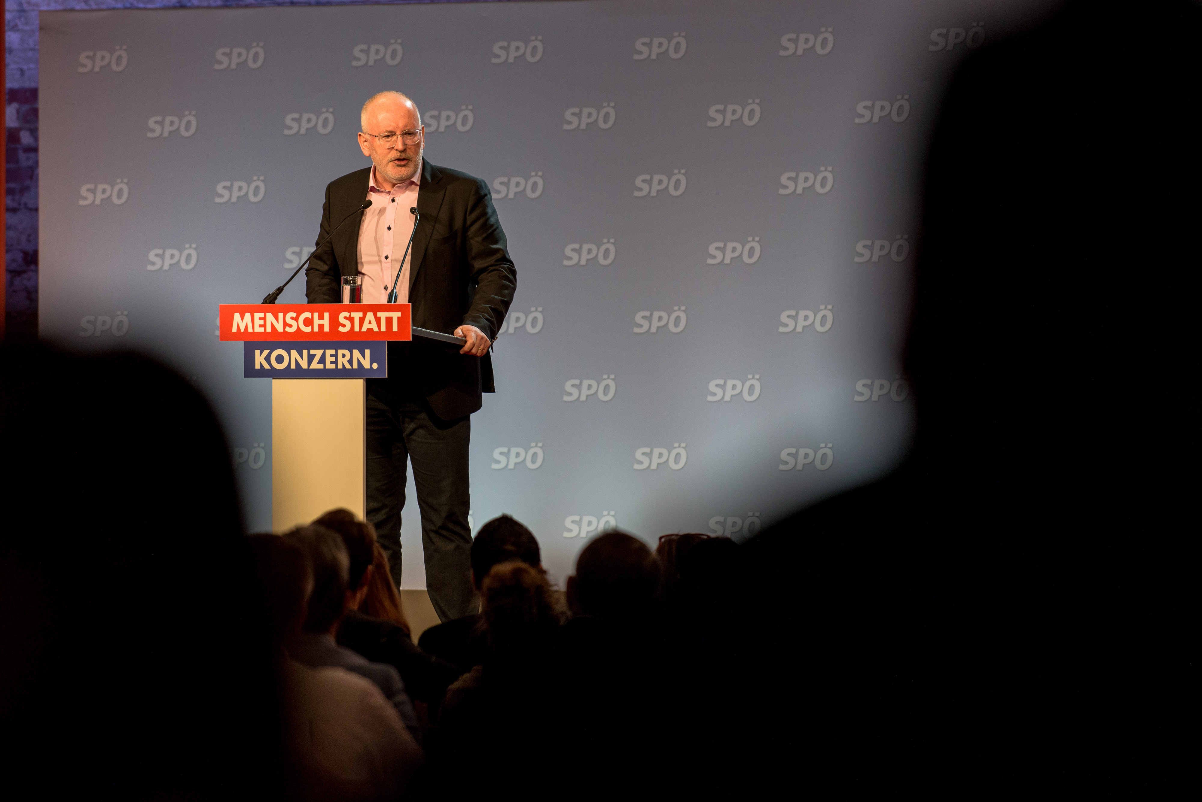 am 6. April startete die SPÖ in der Expedithalle in Wien in den Europawahlkampf. Mit dabei: SPÖ-EU-Spitzenkandidat Andreas Schieder, SPÖ-Parteivorsitzende Pamela Rendi-Wagner, der europaweite Spitzenkandidat der SozialdemokratInnen Frans Timmermans u.v.m.